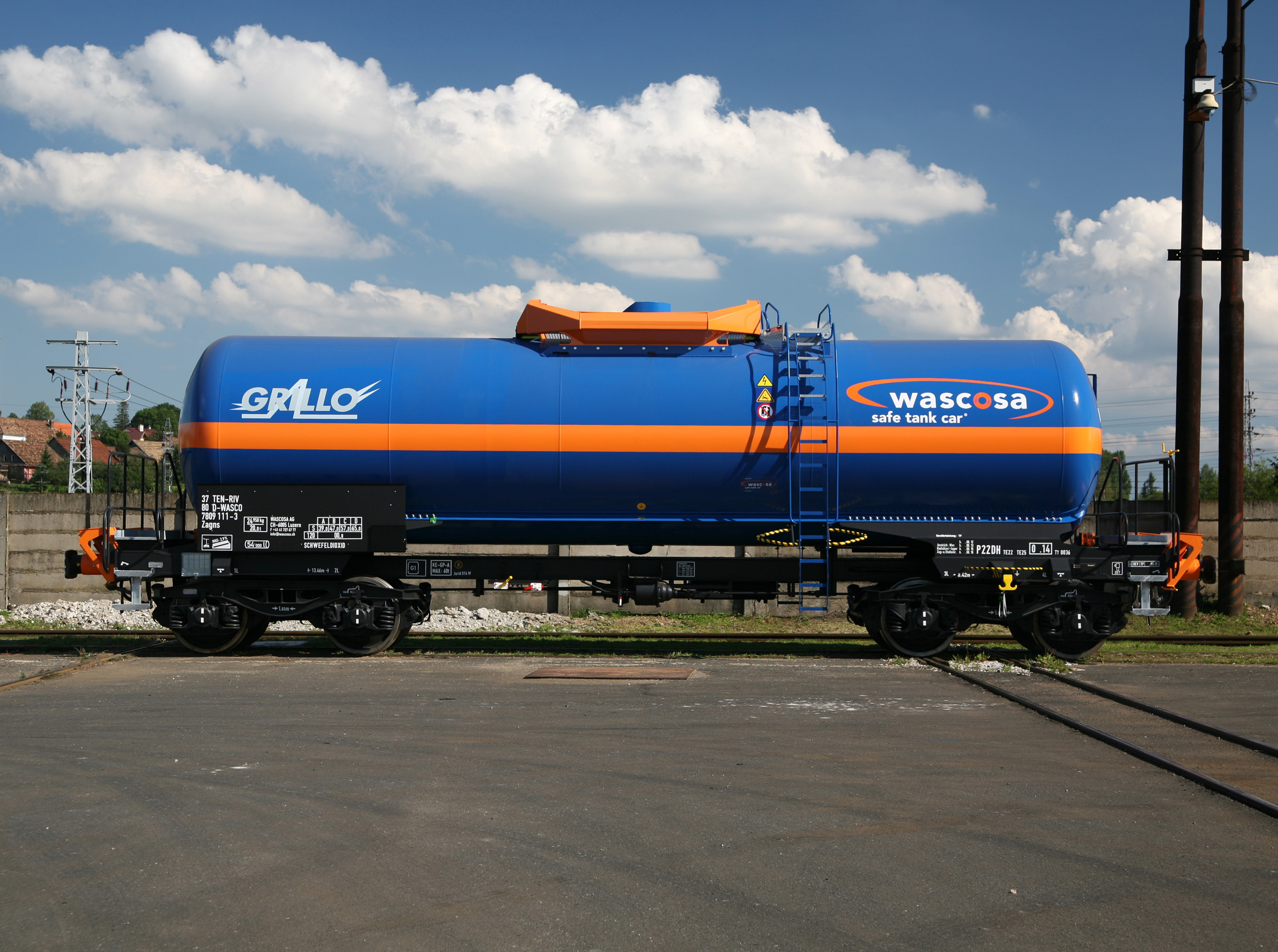 WASCOSA safe tank car® – der neue Sicherheits-standard für die Branche